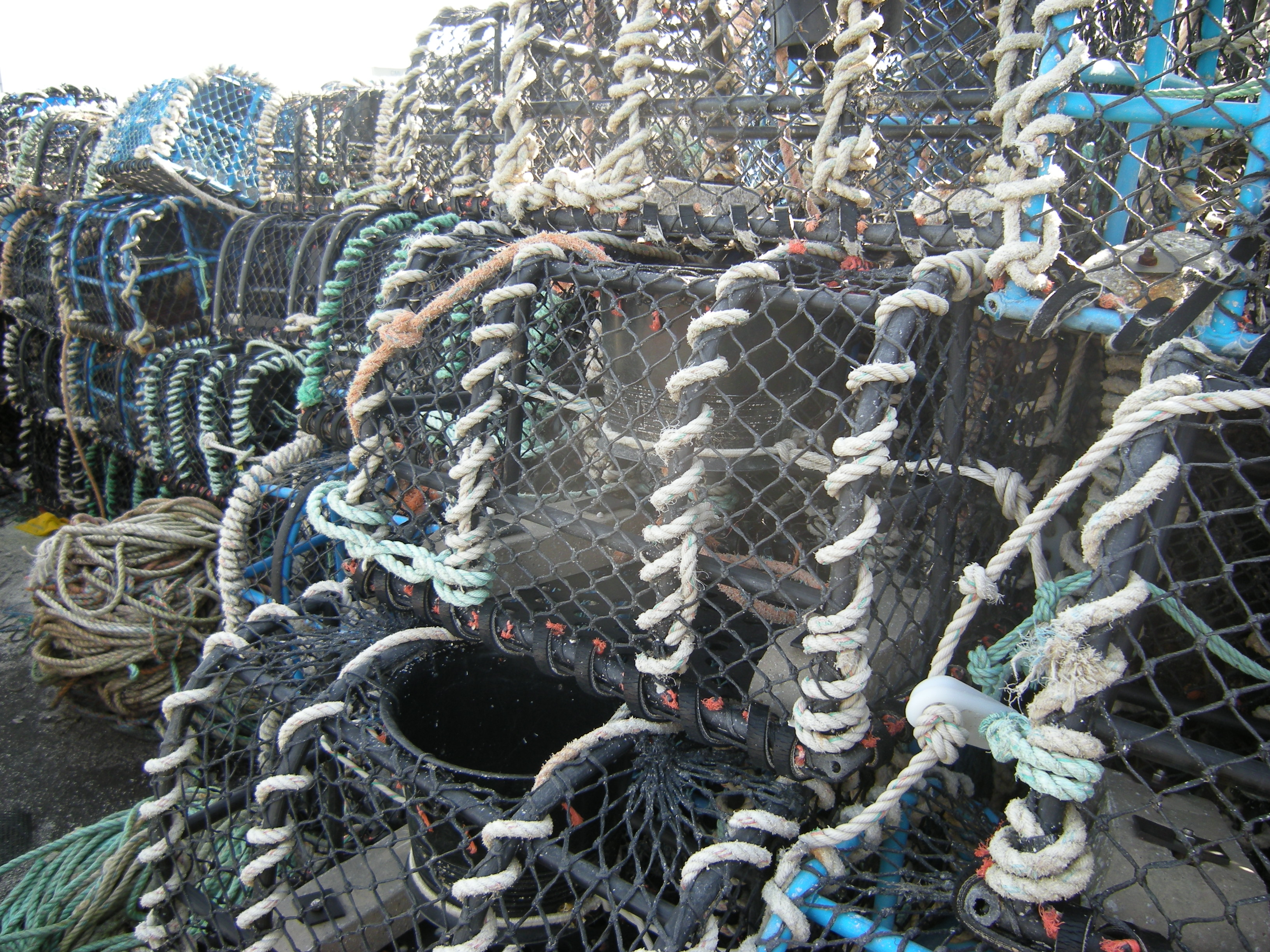 Vues de Ploubazlanec depuis Pors-Even et depuis la Croix des veuves : Pors-Even, île Saint-Riom et baie de Launay Casiers à homards à Pors-Even, Ploubazlanec